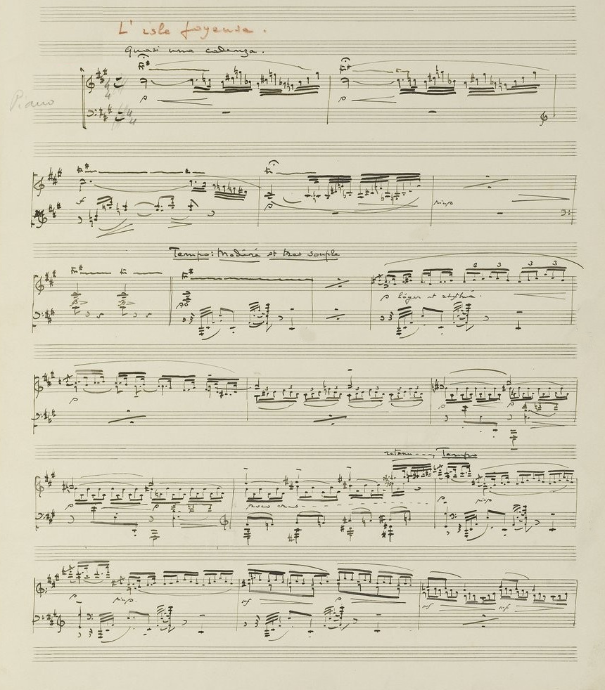 Première page de la partition autographe de L'Isle joyeuse de Claude Debussy, publié en 1904.